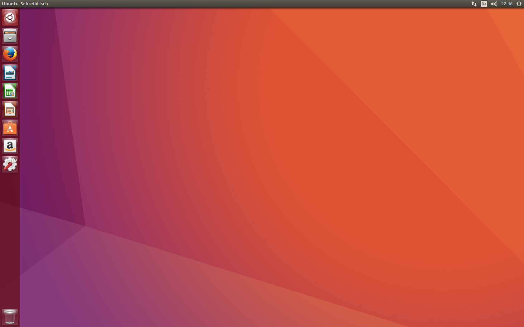 Desktop von Ubuntu 16.10